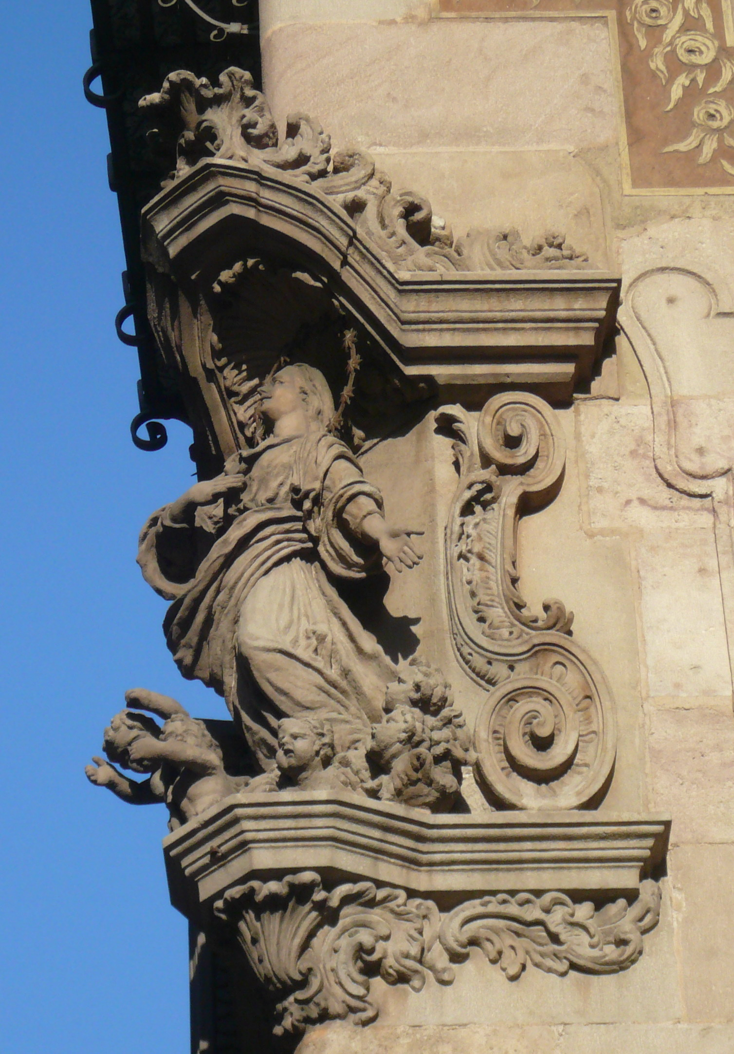 Casa del Gremi de Velers (Barcelona). Imatge de la Verge de Nostra Senyora dels Àngels, patrona del gremi, obra de l’escultor Joan Enrich